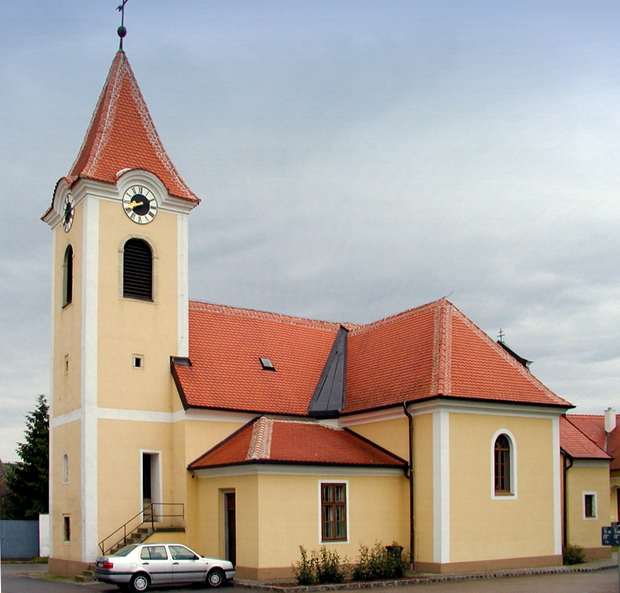 Pfarrkirche Maria Verkündigung in Goggendorf, Sitzendorf an der Schmida Object location48° 37′ 10.09″ N, 15° 56′ 02.9″ E